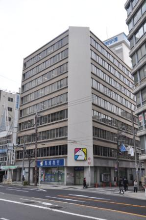 本社のある近鉄北ビル